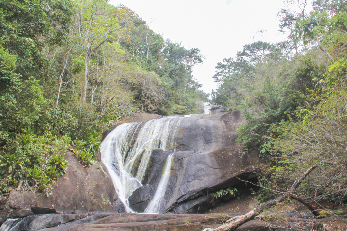 Viajando y conociendo mi hermoso país desde el año 2008. Cada vez más orgulloso de ser Venezolano!